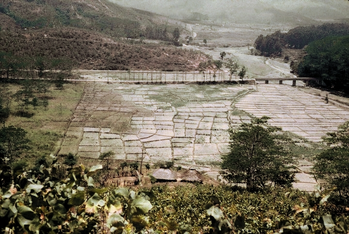 A planície da Ermera e ribeira da Gleno